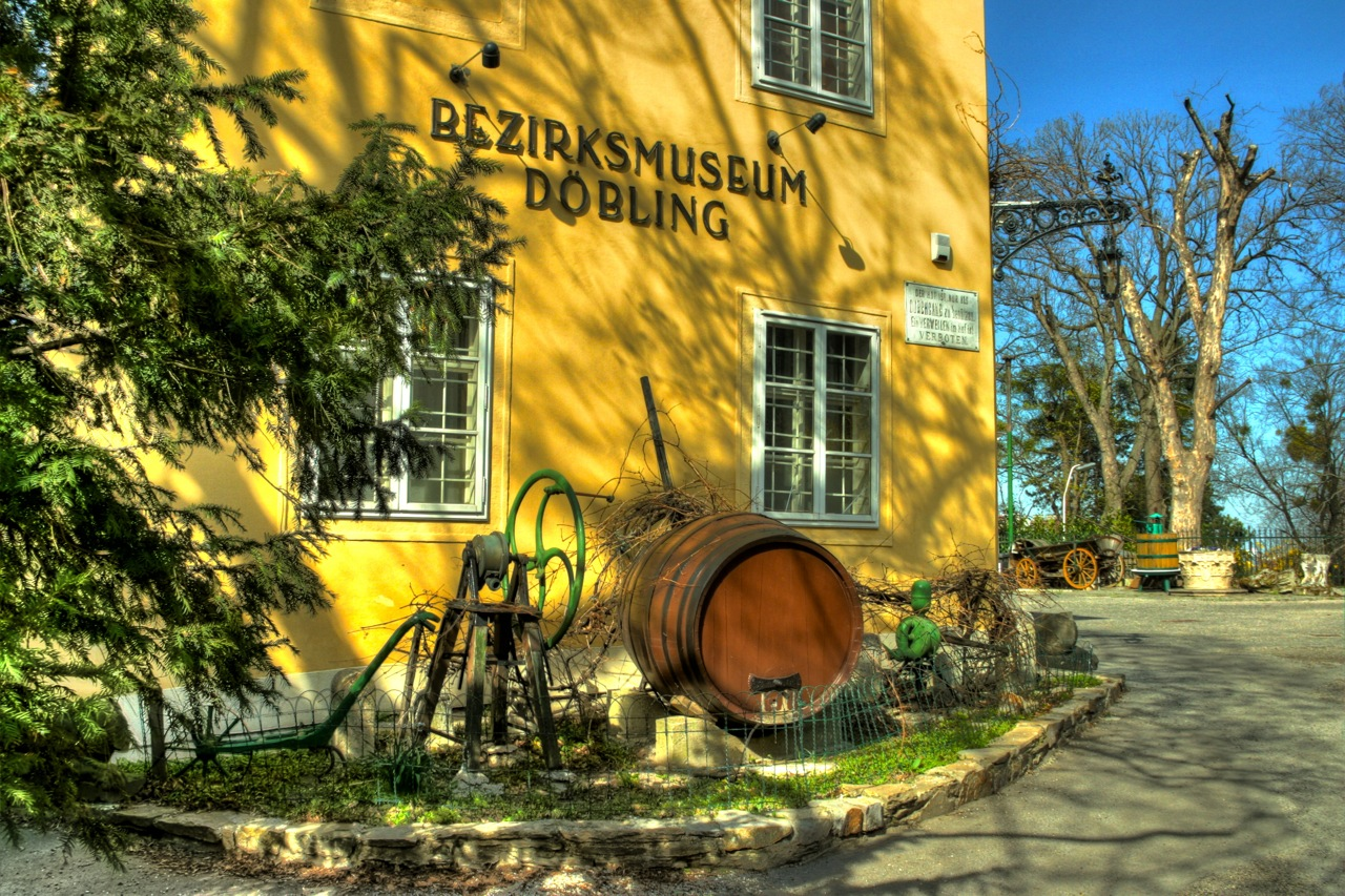 Bezirksmuseum Doebling in der Wertheimsteinvilla